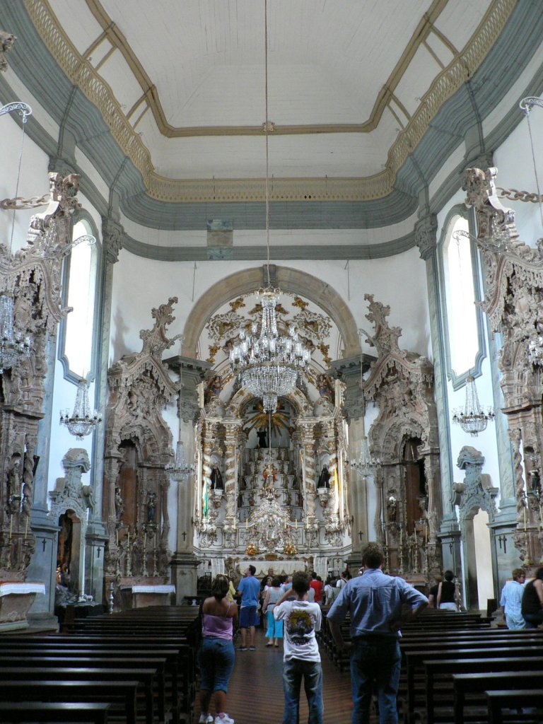 Interior of St Francisco Church in São João del-Rei, Brazil